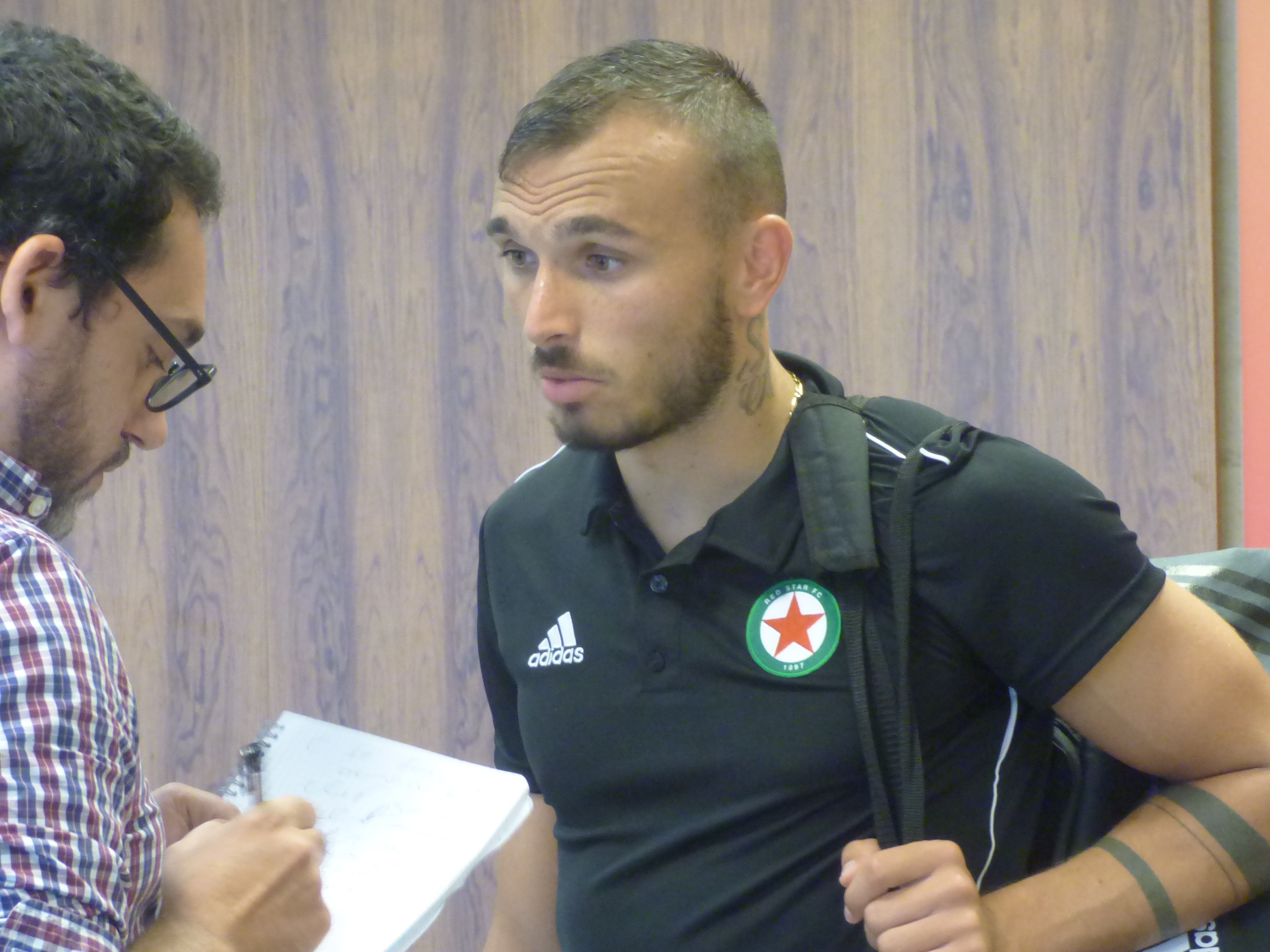 Teddy Teuma après le match RC Lens / Red Star, comptant pour la deuxième journée du championnat de France de Ligue 2 2018-2019 au Stade Bollaert-Delelis, le 4 août 2018.